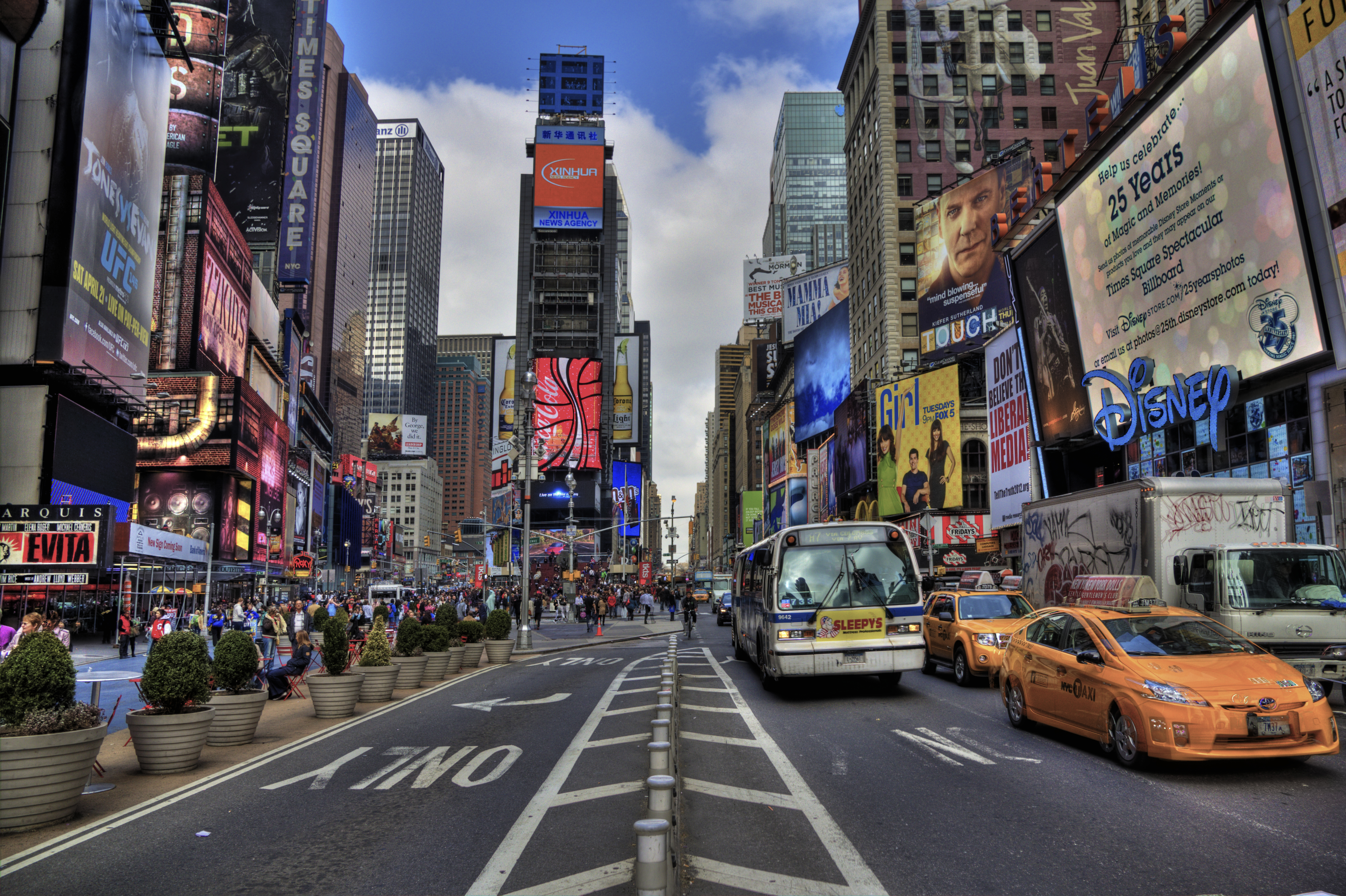 Times Square